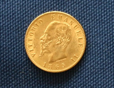 Viktor Emanuel II